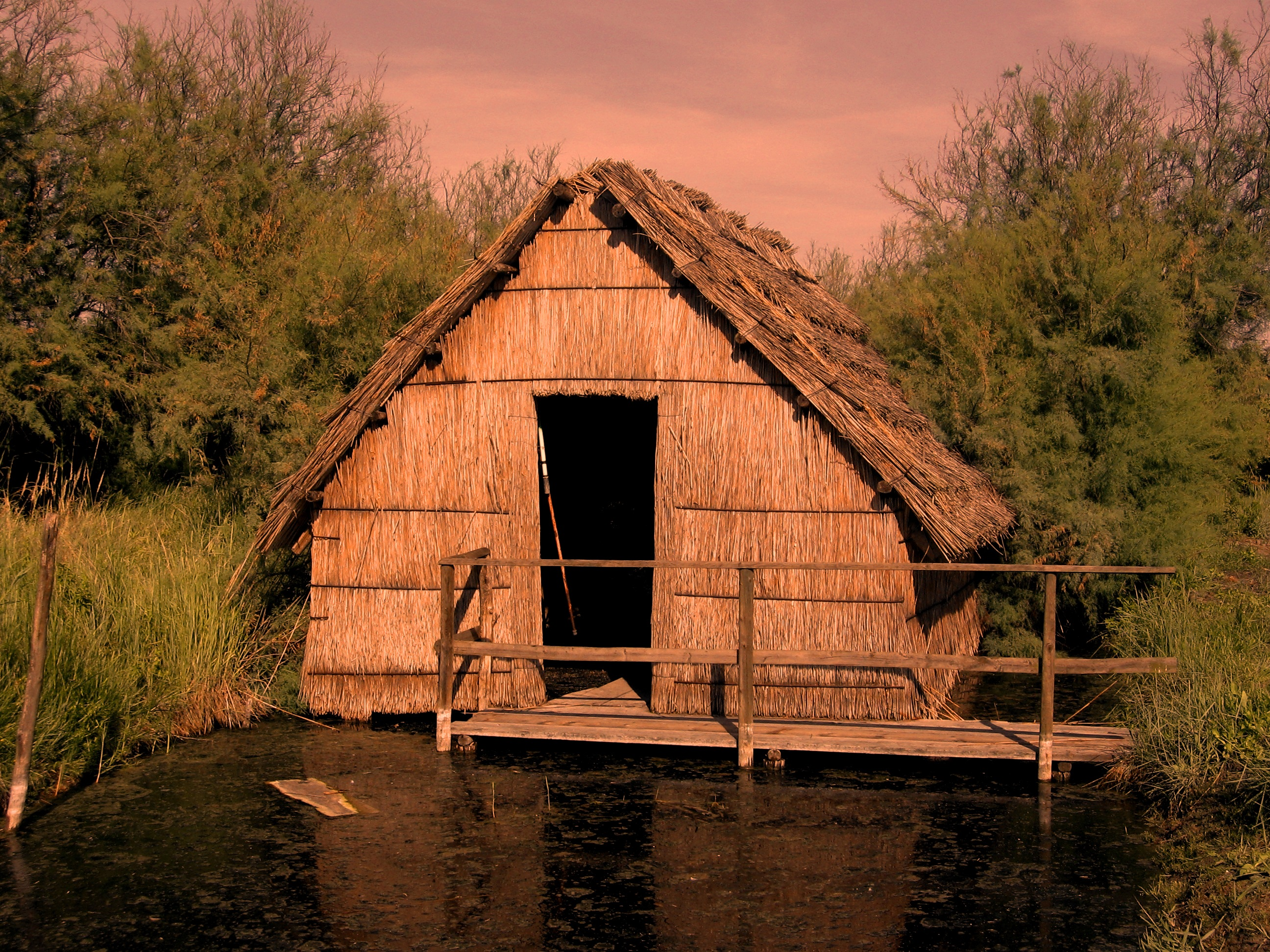 Valle Averto This is a photo of a monument which is part of cultural heritage of Italy. The authorisation for taking photos of this object was provided by the World Wide Fund for Nature Italy.